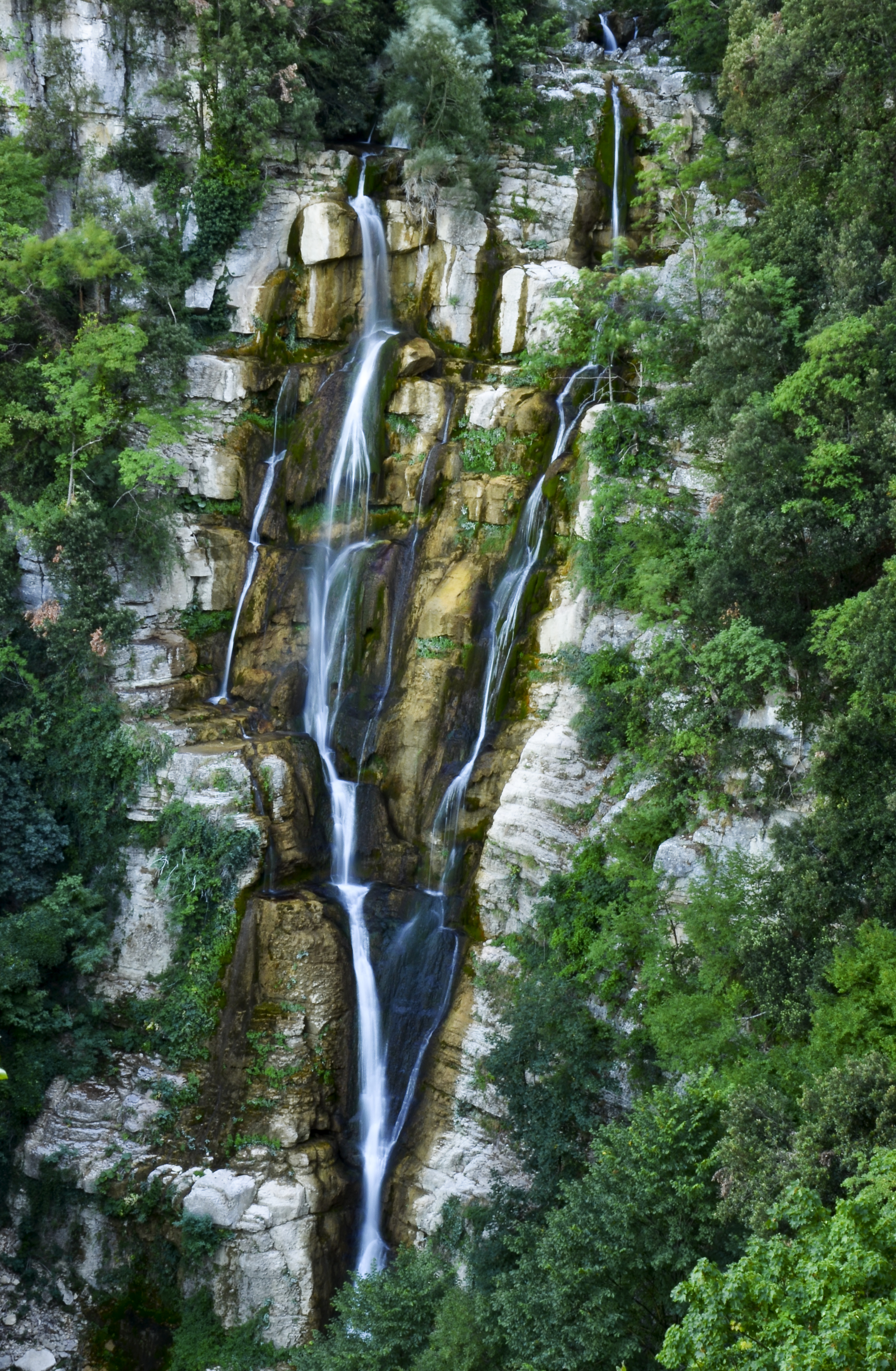 La Riserva Naturale Regionale "Cascate del Rio Verde", Oasi WWF, fu istituita con L.R. n. 72/2001 e si trova in territorio di Borrello (CH), al confine con il Molise. L'area protetta, di straordinaria bellezza, è situata nella media valle del fiume Sangro e si estende su una superficie complessiva di 287,50 ettari, ad una altitudine variabile tra i 400 e i 900 m. slm. All'interno della Riserva si cela una delle meraviglie del territorio abruzzese: le spettacolari "Cascate del Verde" (o del Rio Verde), le cascate naturali più alte d'Italia e tra le maggiori dell'intero continente europeo. This is a photo of a monument which is part of cultural heritage of Italy. The authorisation for taking photos of this object was provided by the World Wide Fund for Nature Italy.